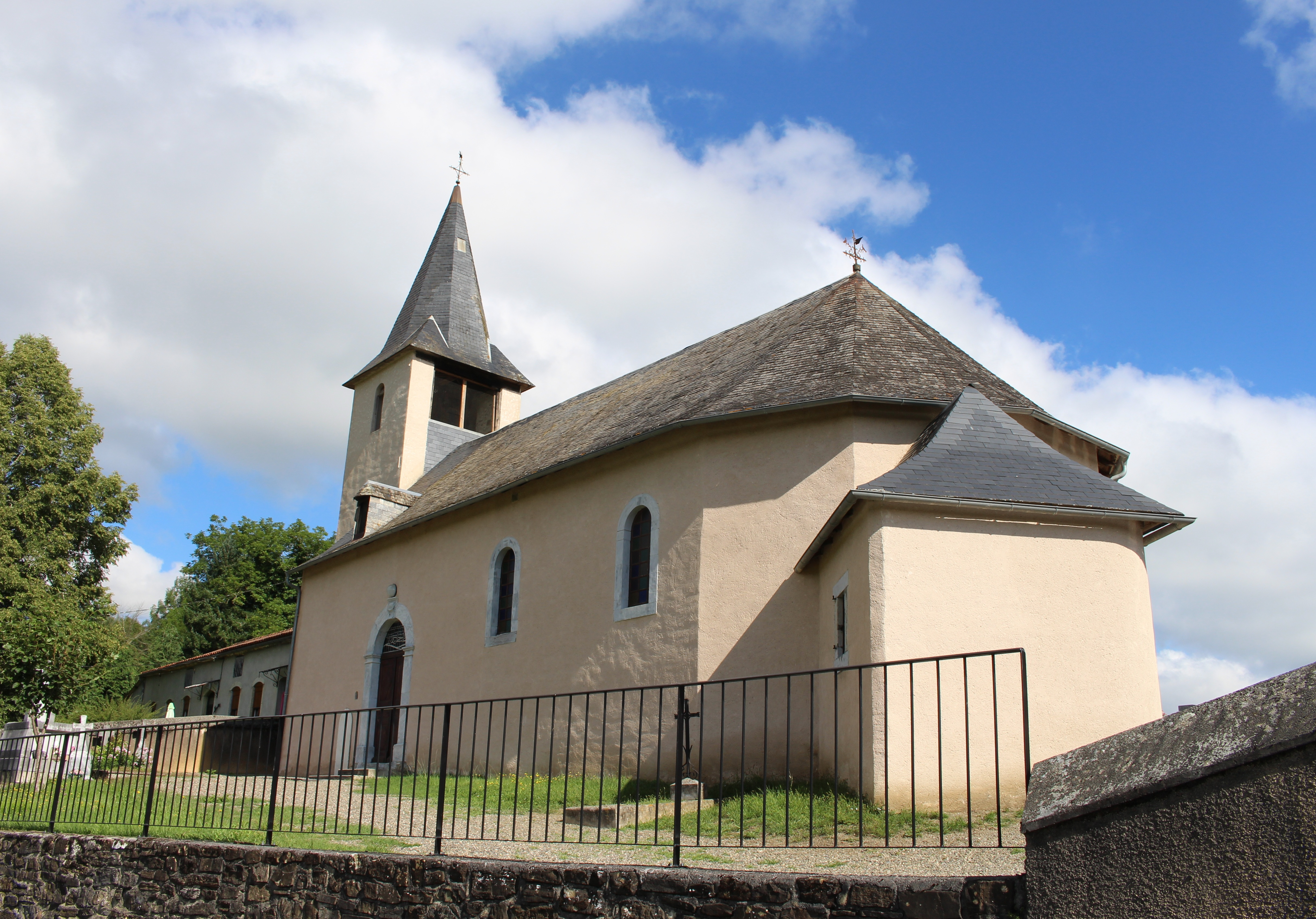 Église Saint-Nicolas de Bonnemazon (Hautes-Pyrénées)